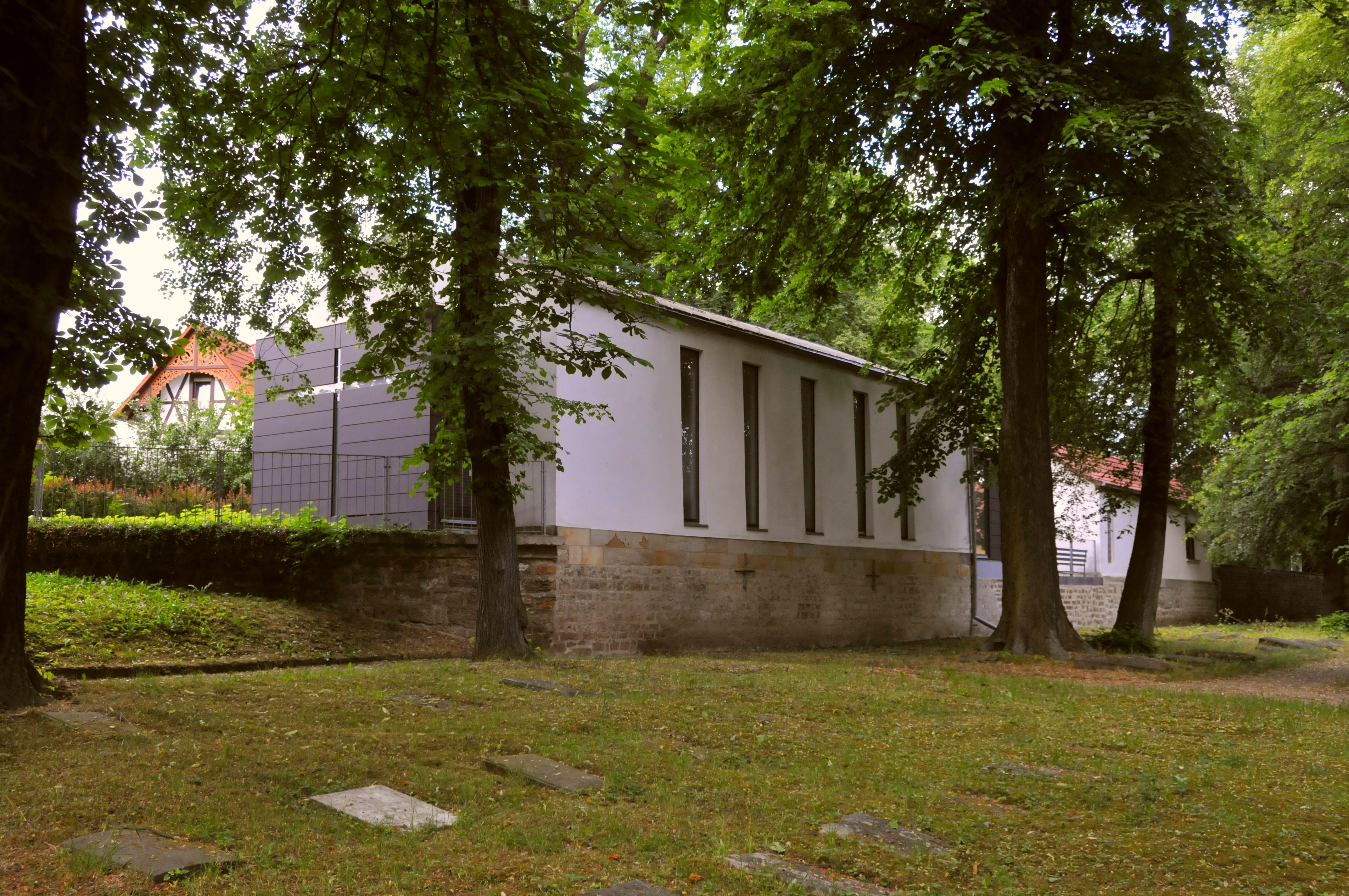 Neudietendorf, kath. Kapelle St. Raphael